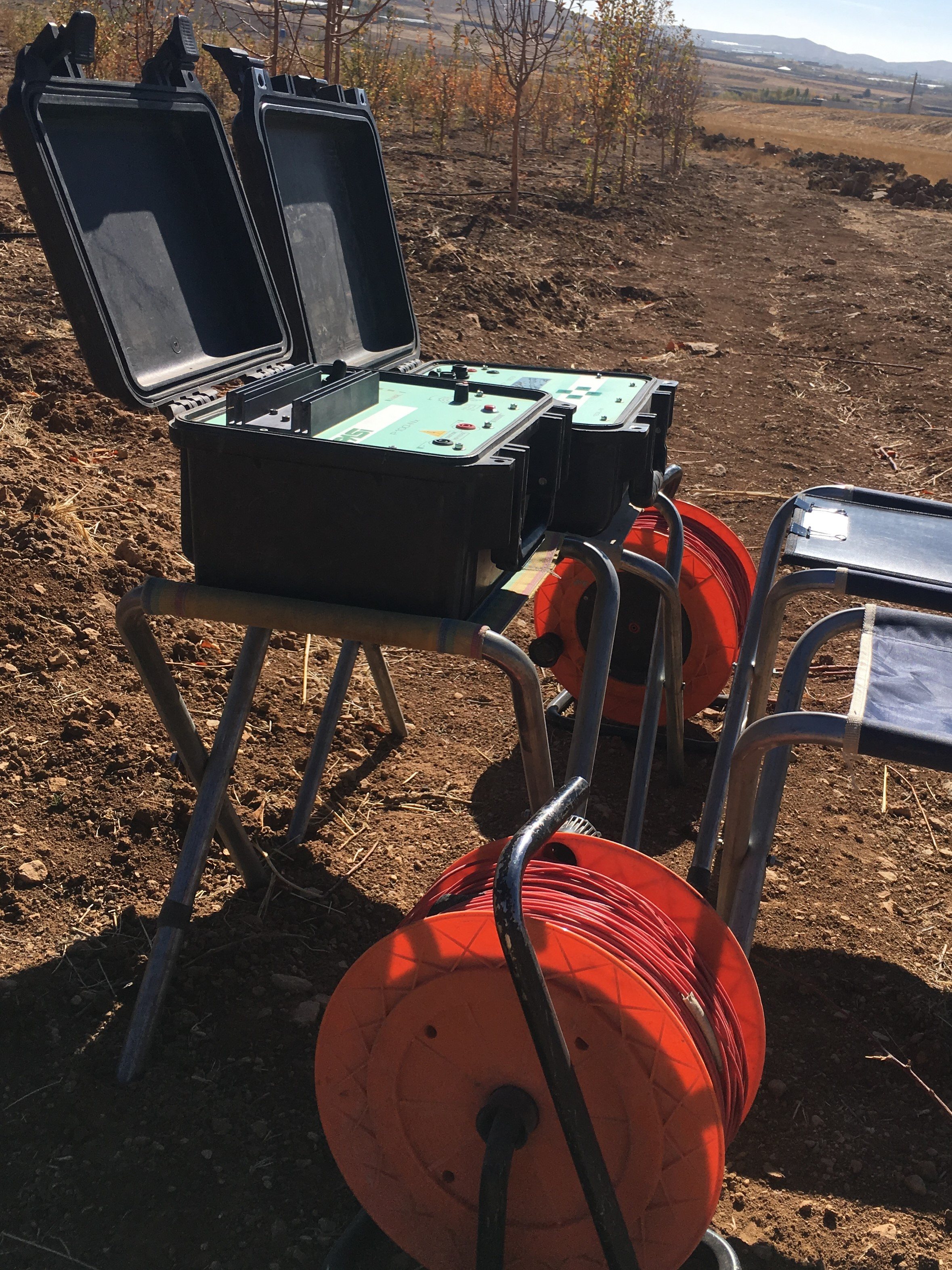 دستگاه ژئوالکتریک